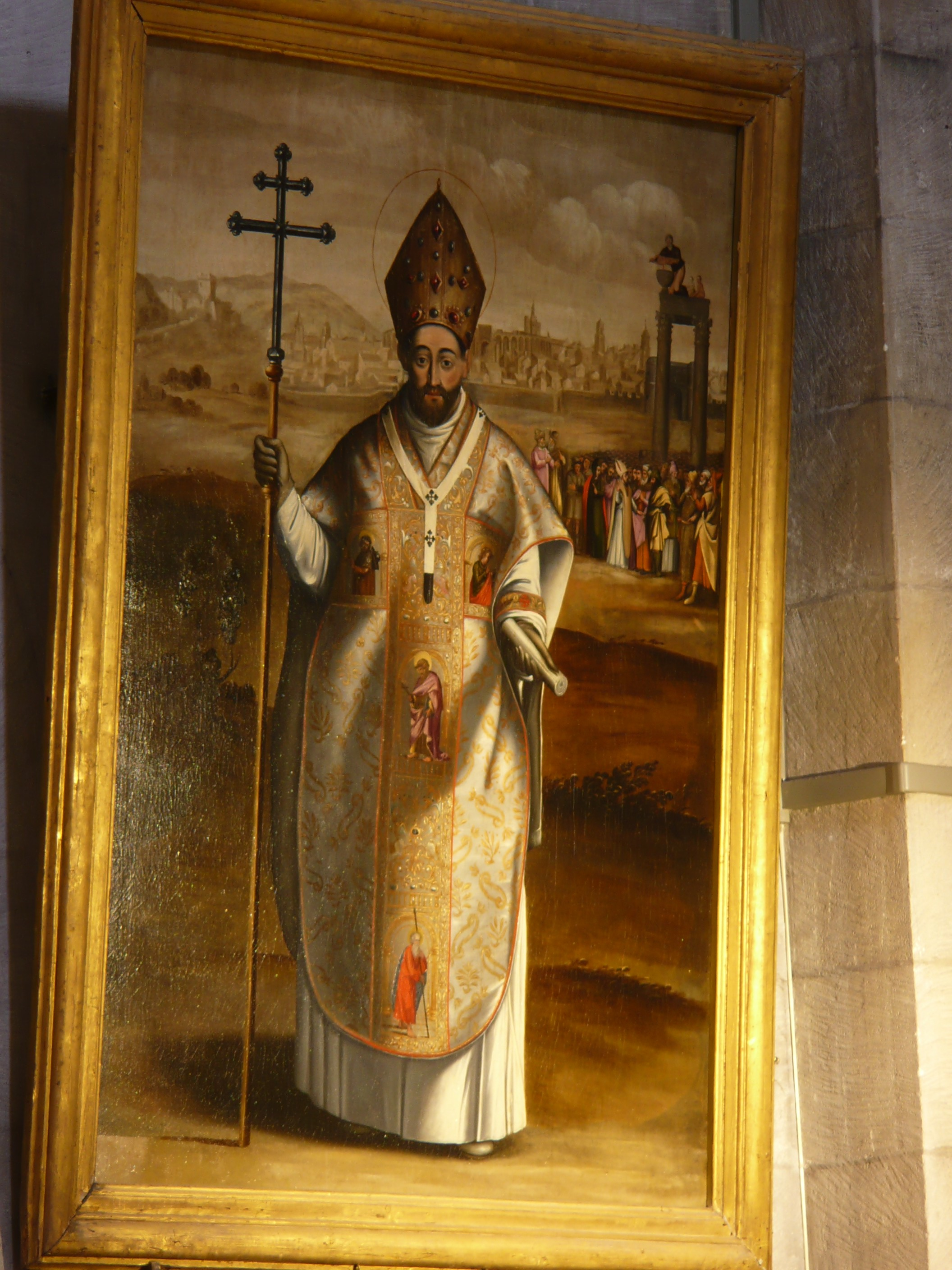 Arles (Bouches-du-Rhône, France), primatiale St Trophime, dans le collatéral sud toile anonyme du 17e siècle représentant St Trophime en tenue d'évêque sur fond de ville, certainement Arles, attribué, selon l'abbé Paulet et L.-H.Labande, à Jean Baptiste Marie Fouque.